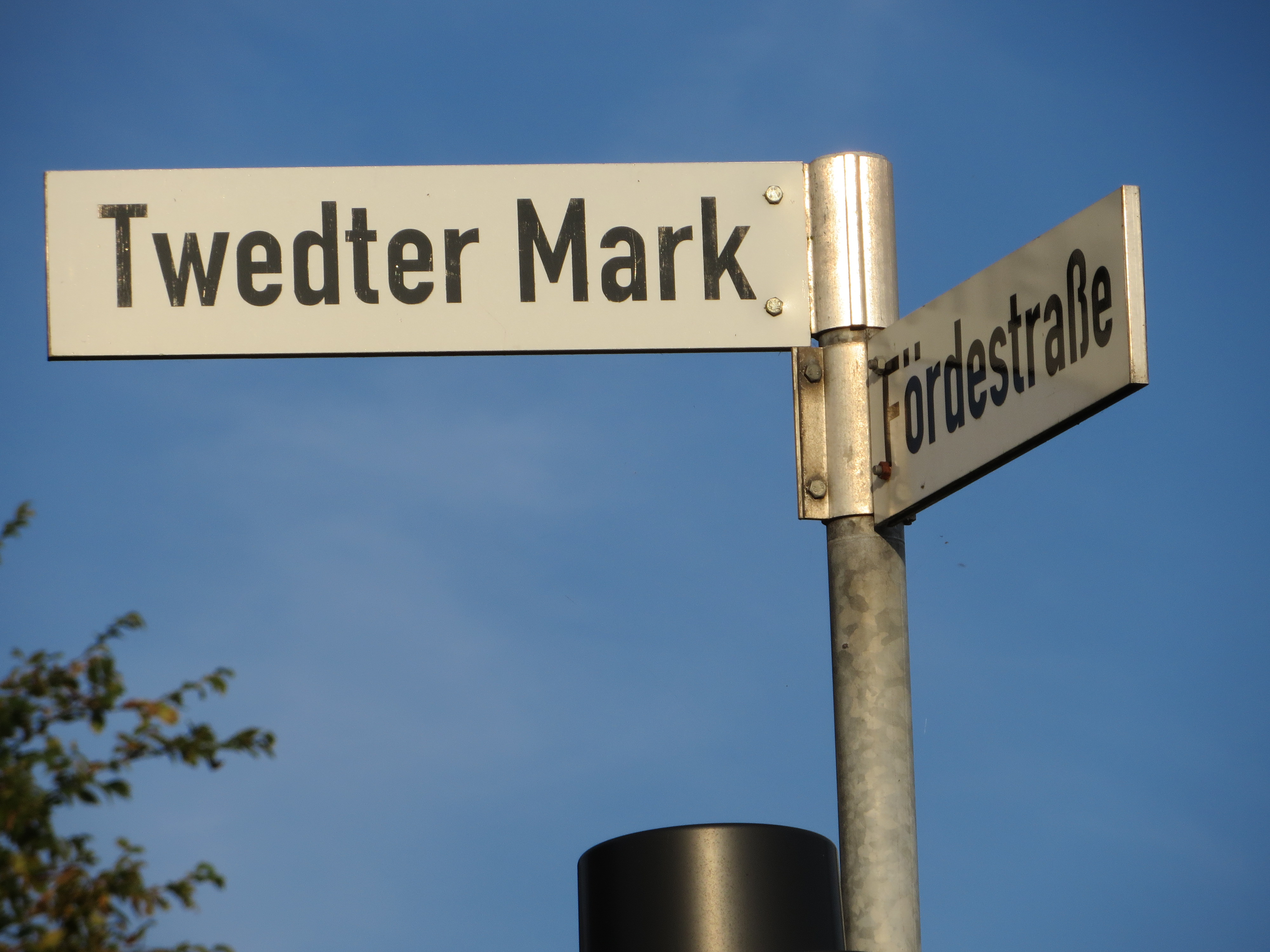 Schild Twedter Mark und Fördestraße (Flensburg 2014)